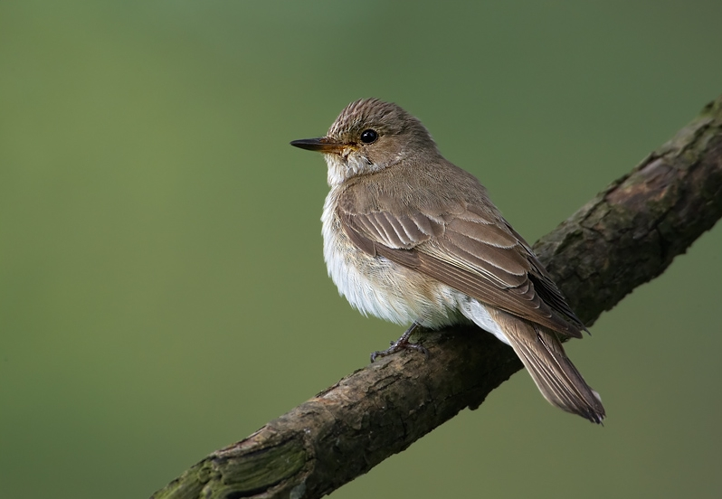 Muscicapa striata, Litovelské pomoraví, CZ